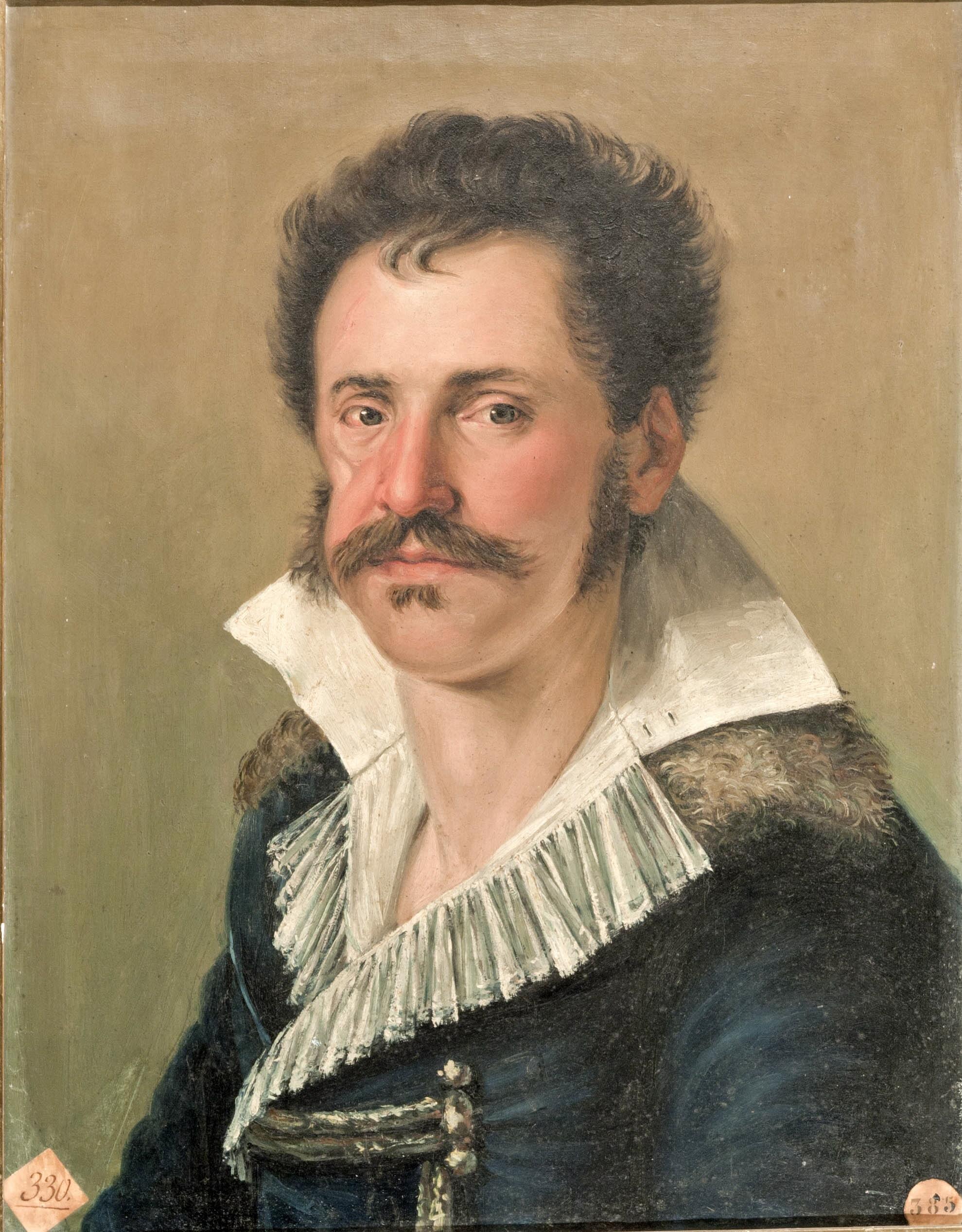 José María Halcón y Mendoza, Retrato de John Downie, 1819. Óleo sobre lienzo, 60 x 47 cm, Madrid, Real Academia de Bellas Artes de San Fernando. Donado a la Academia por su autor para ser admitido como académico de mérito.